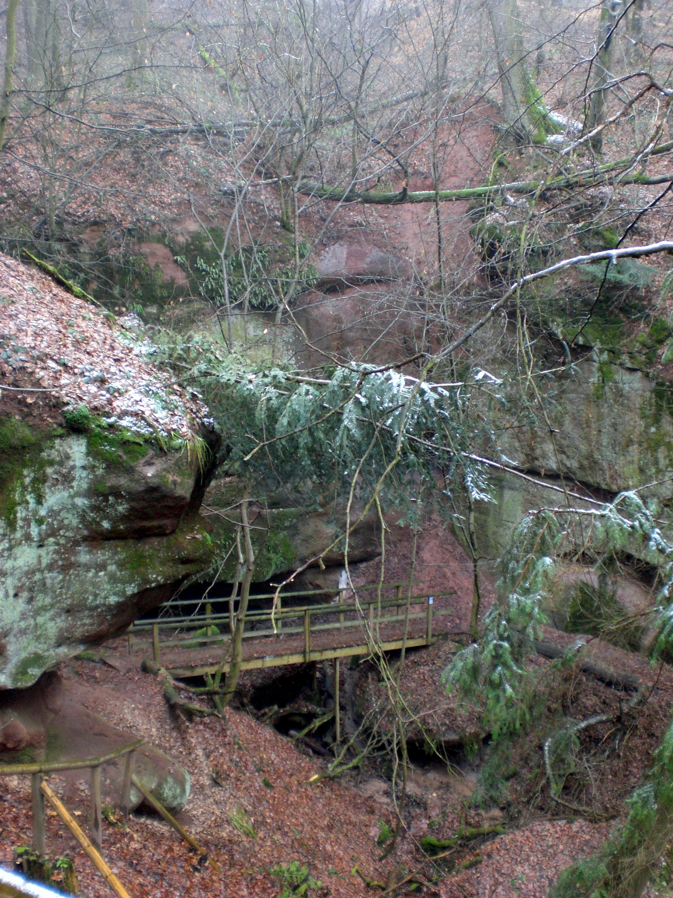 Schnittlinger Loch